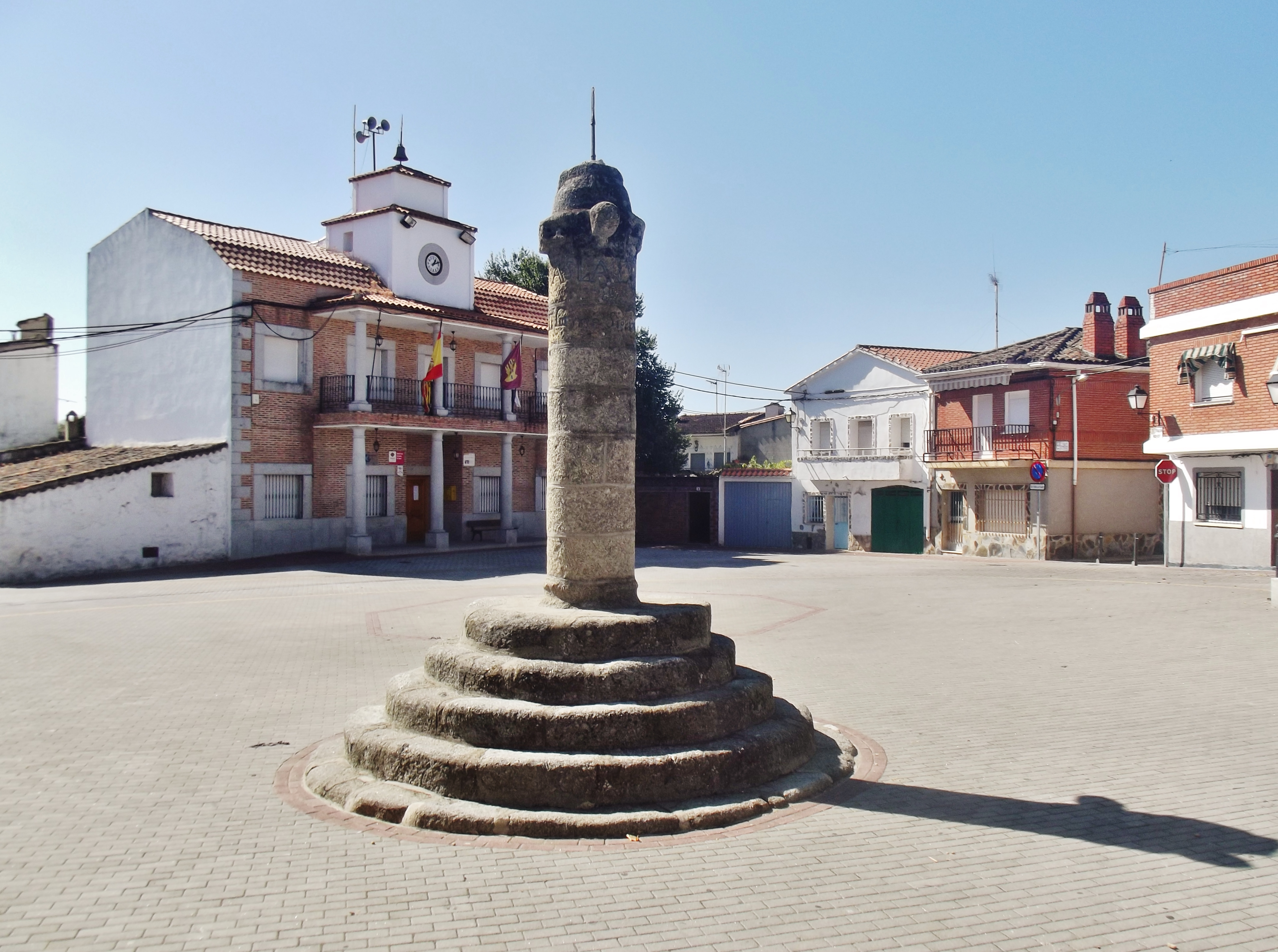 Plaza Mayor de Montesclaros